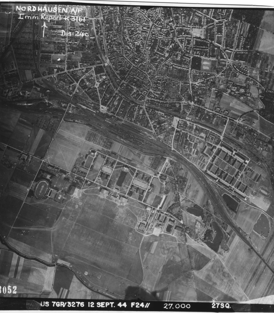 Luftaufnahme der Stadt Nordhausen. Am unteren Bildrand ist der Fliegerhorst von Nordhausen und am rechten mittleren Bildrand die Boelcke-Kaserne zu erkennen, in der ab dem 8. Januar 1945 ein Außenlager des Konzentrationslagers Mittelbau-Dora eingerichtet wurde. Das Foto stammt aus den Military Intelligence Photographic Interpretation Reports (MIPI Reports) des Hauptquartiers der U.S. Army Air Forces. Diese Bestände befinden sich in den Beständen der National Archives, Washington (Record Group 341).